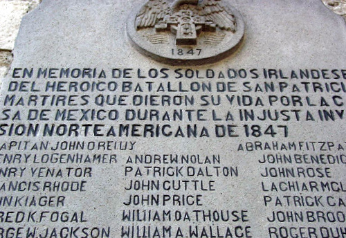 Placa conmemorativa en homenaje al Batallón de San Patricio en la Plaza de San Jacinto, San Angel, ´Mexico, Distrito Federal.